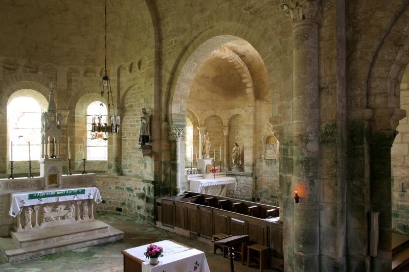 Choeur de l'église de Saint-Germain-en-Brionnais